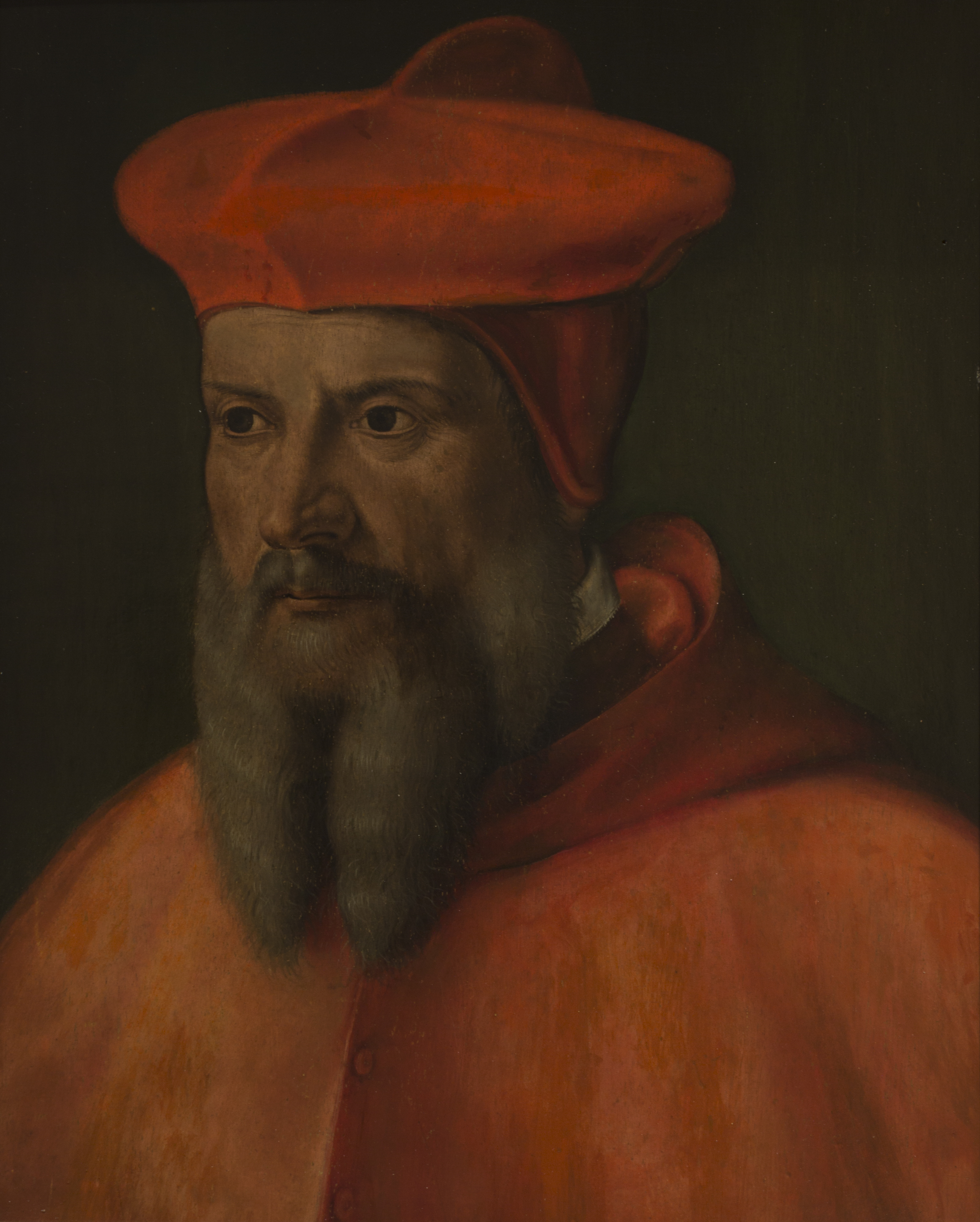 Portrait du cardinal de Tournon. Huile sur bois.